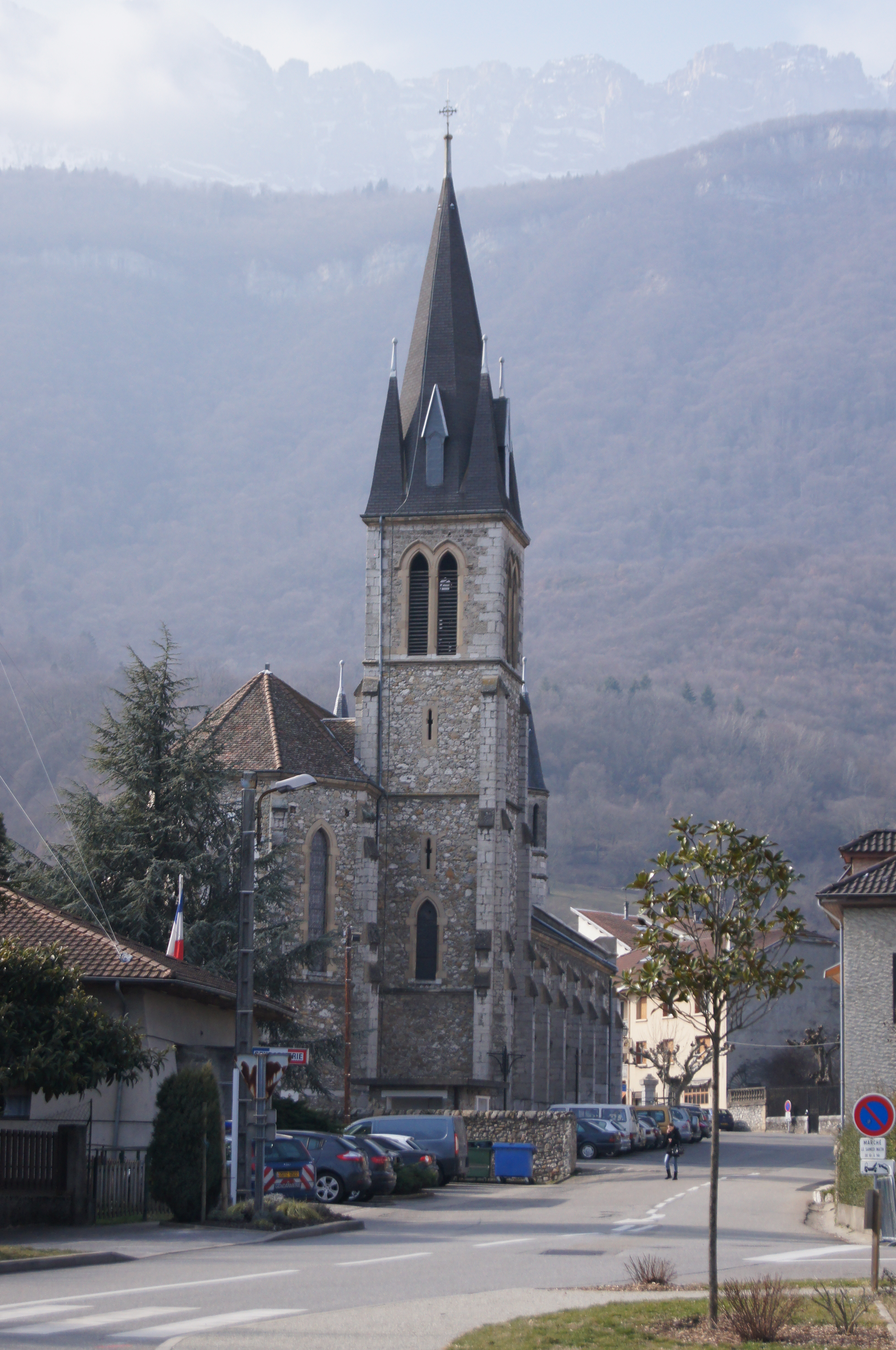 Eglise LE TOUVET